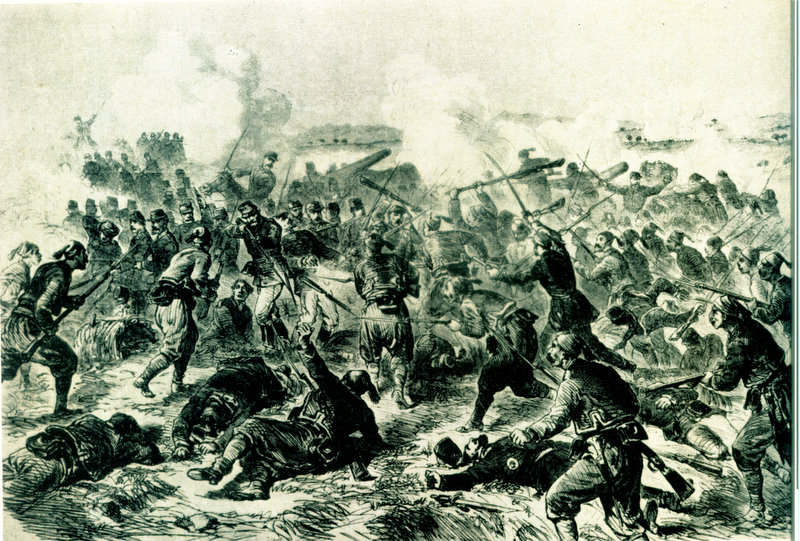 Атаката на Осман паша срещу руските позиции при Пелишат-Згалево на 19 август 1877 г.